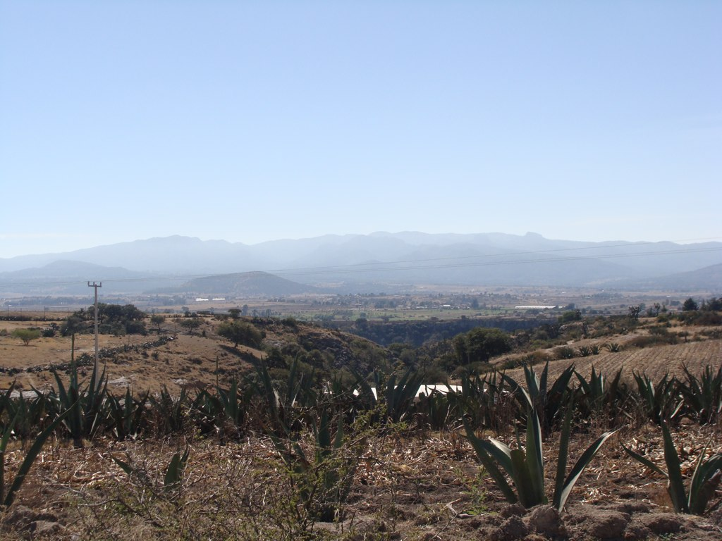 on the road to Tenango